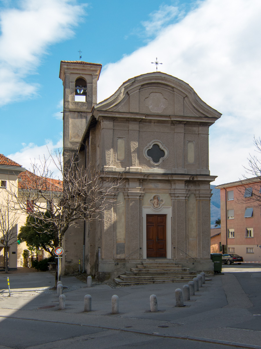 Oratorio di San Sebastiano in Breganzona, Lugano